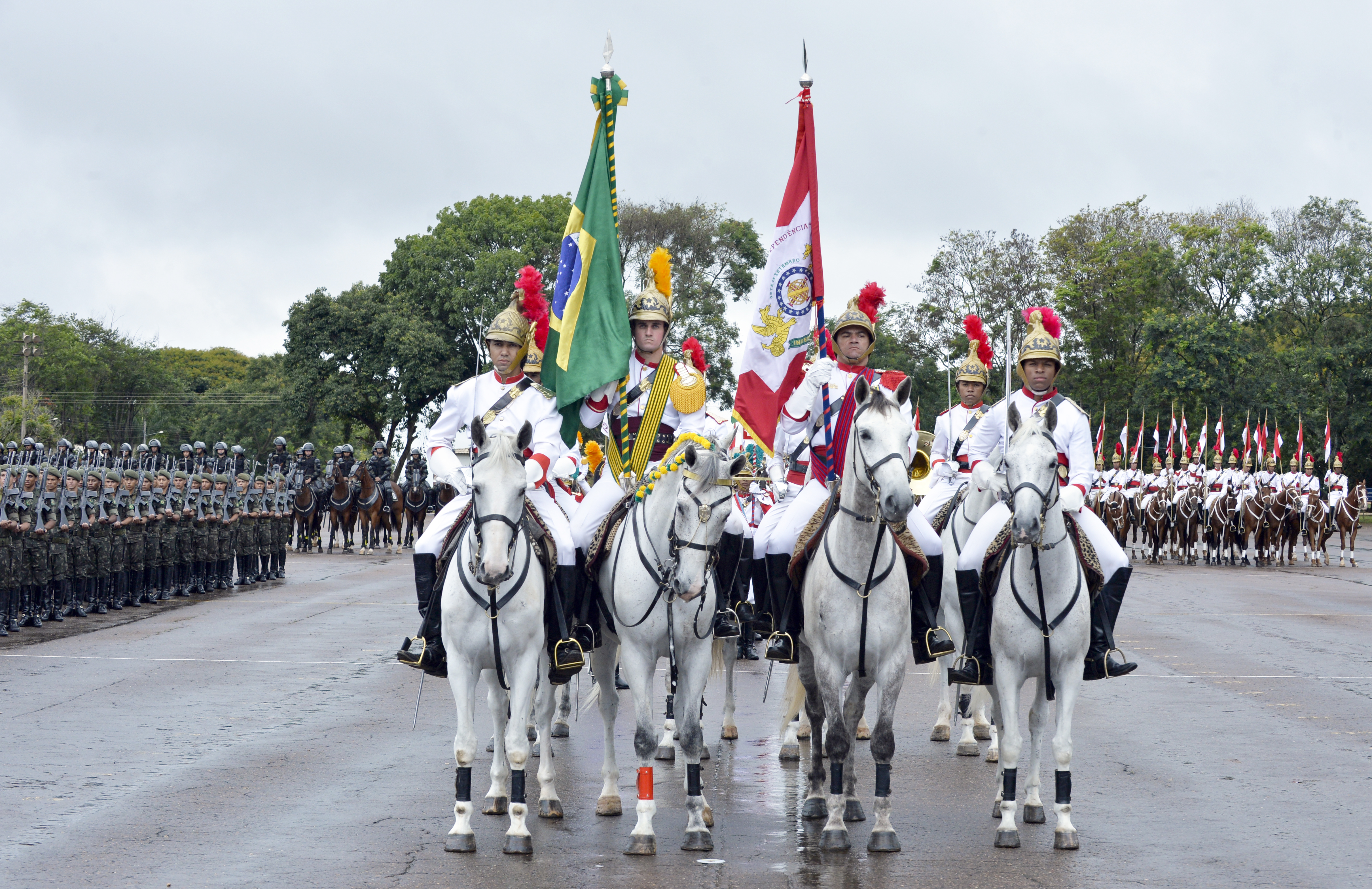 15/01/2016, Brasília - DF Fotos: Gilberto Alves